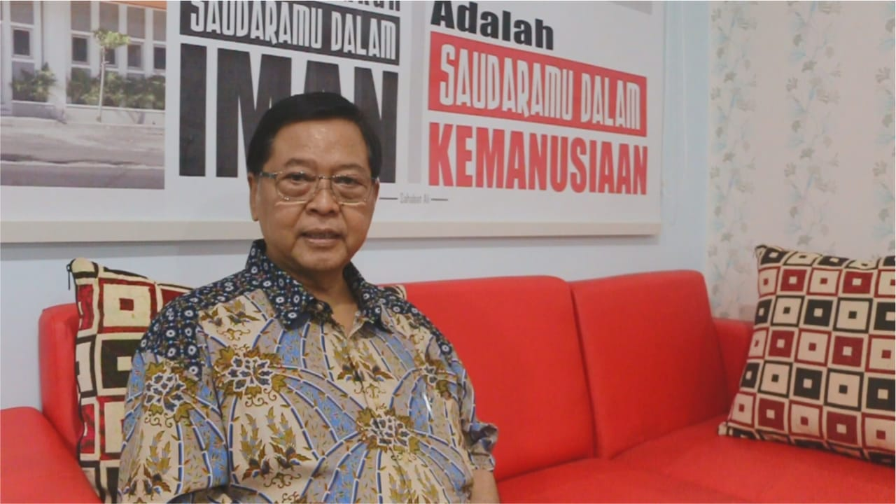 foto sumartono hadinoto di kantor PMI Kota Surakarta